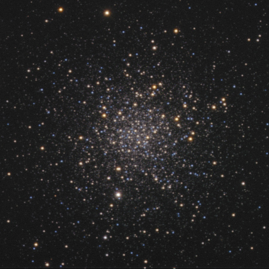 Globular Cluster M12